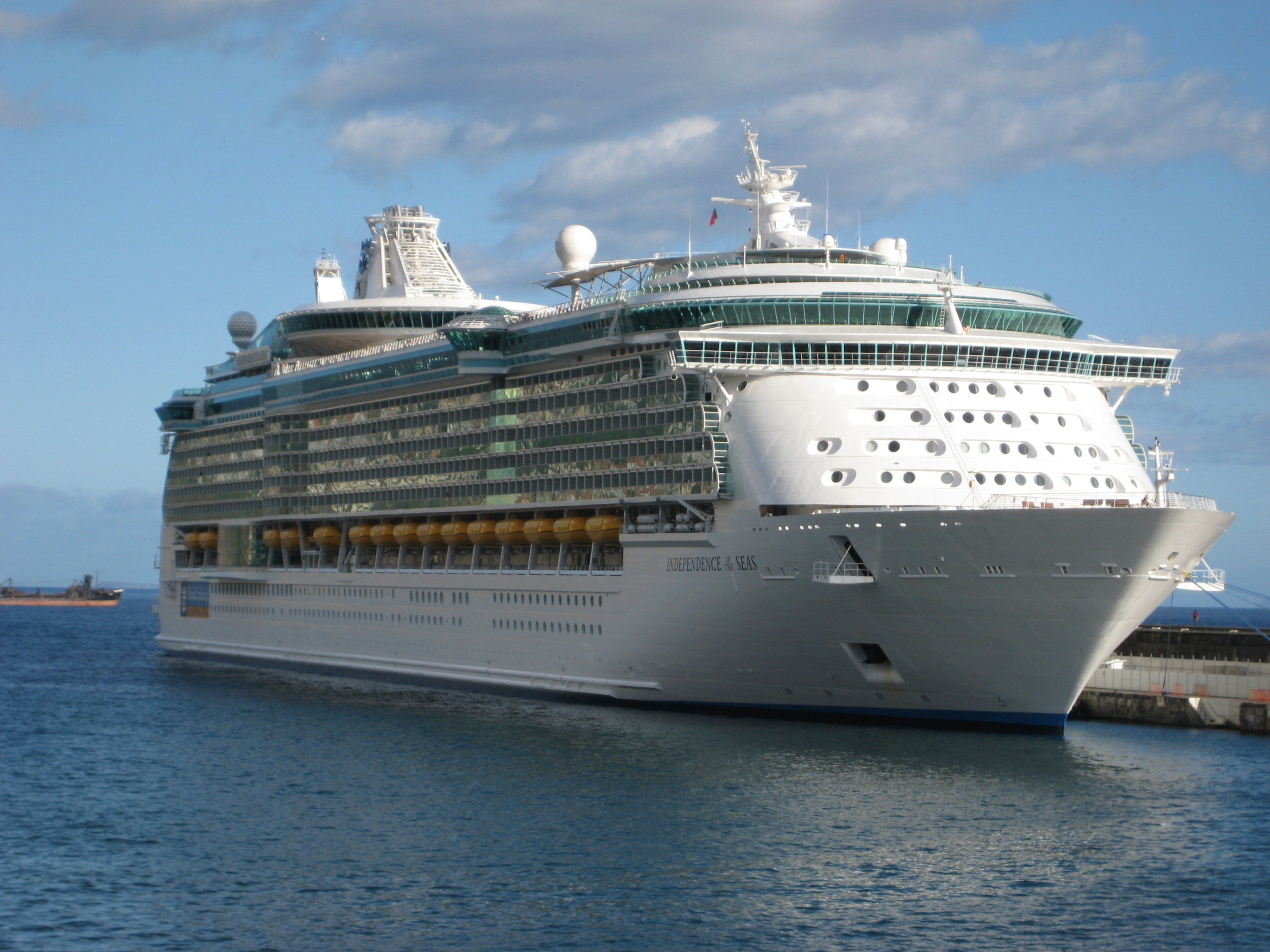 DIndependence of the Seas